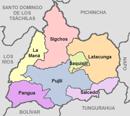 Cantones de la provincia de Cotopaxi